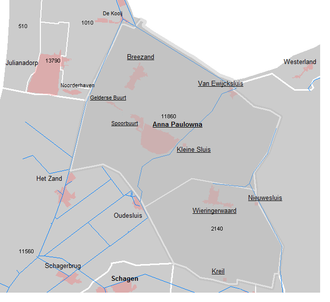 Kaart Anna Paulowna, Noord-Holland.